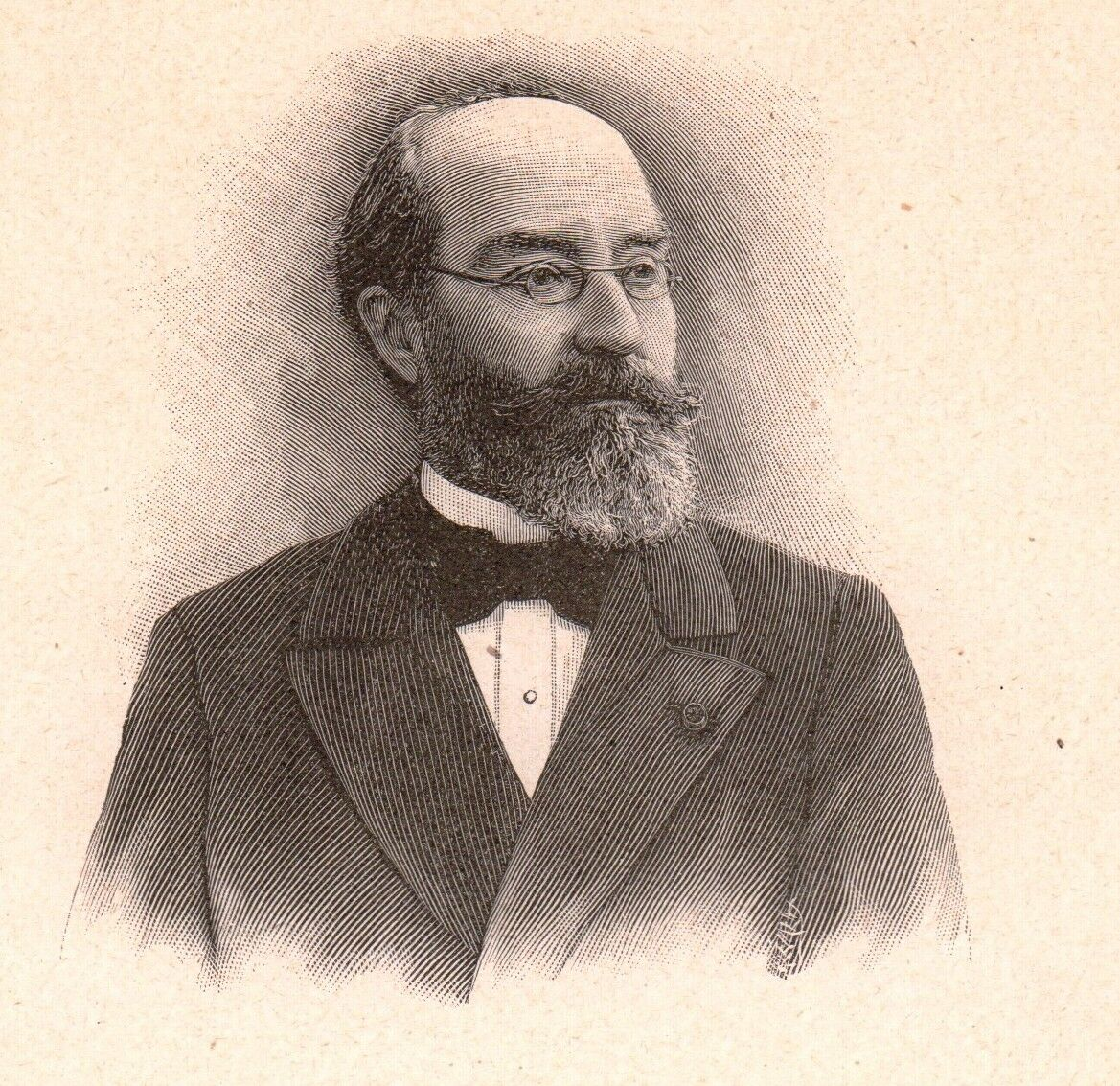 Marie-Adolphe Carnot, gravure dans l'Album Mariani, tome XI, 1908